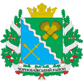 Герб Чорнобаївського району